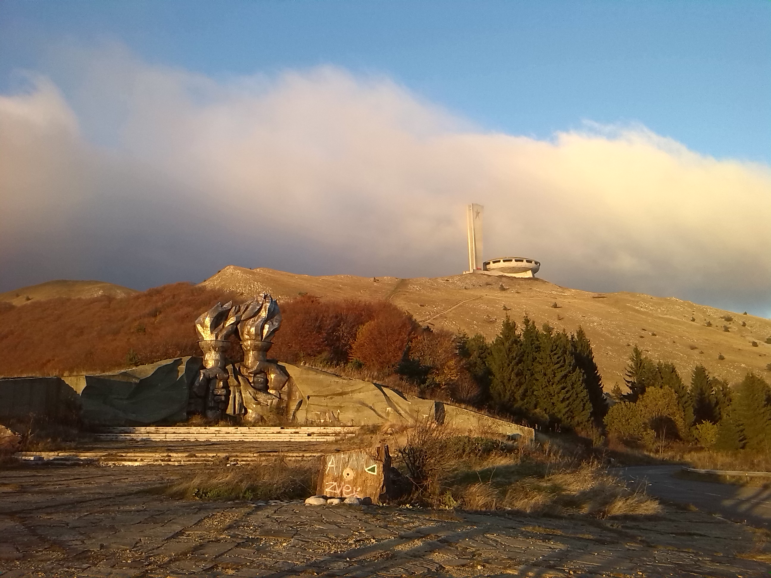 Torch Monument - Buzludzha, Bulgaria